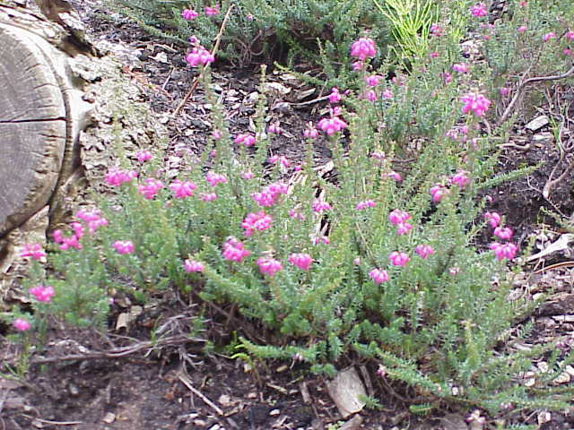 Species: Erica cinera Family: Ericaceae Image No. 2